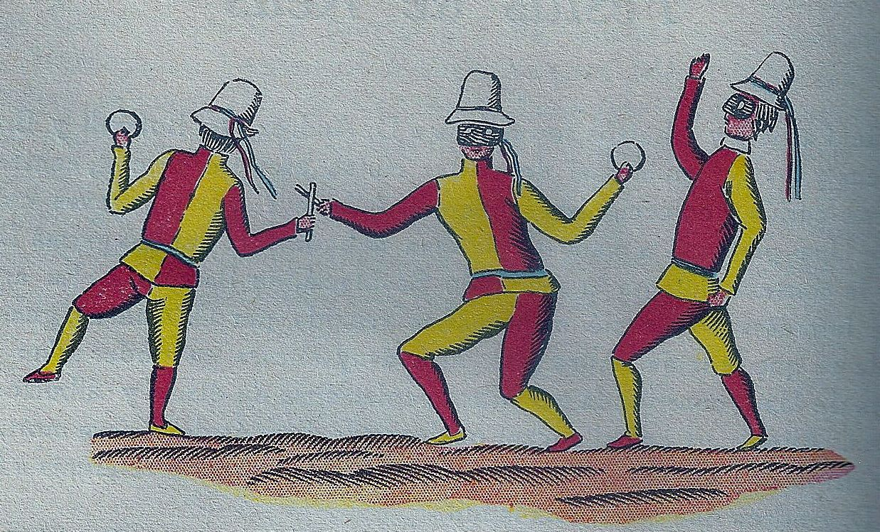 Dibuix de la Dansa de Mossèn Joan de Vic feta per Antoni de Bofarull abans de 1890